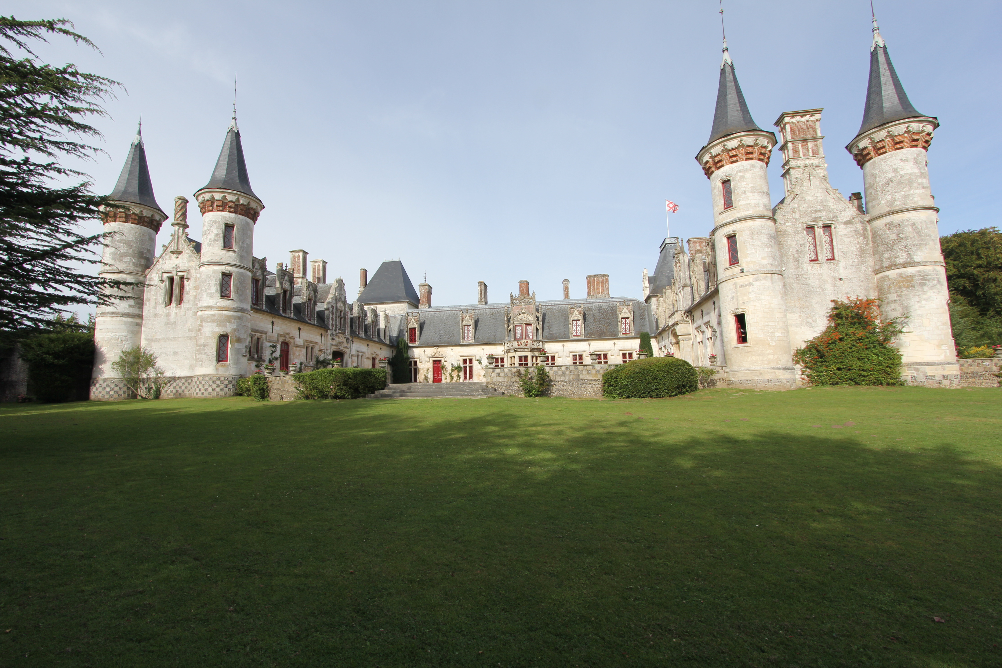 Régnière-Ecluse est située dans le département de la Somme en France.